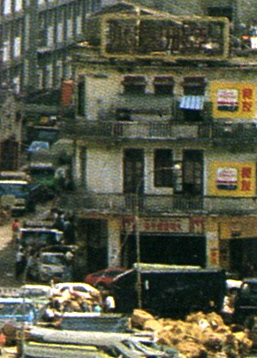 1983年時的澳門施拿地馬路63號木樓